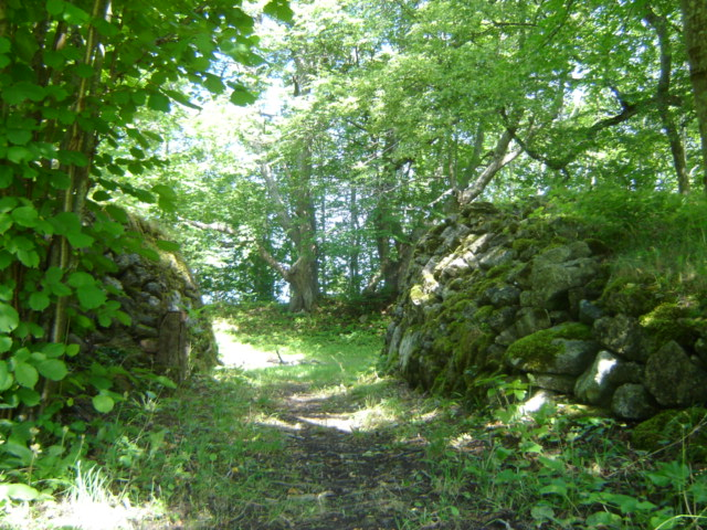 Ringvall Pidula maalinnas